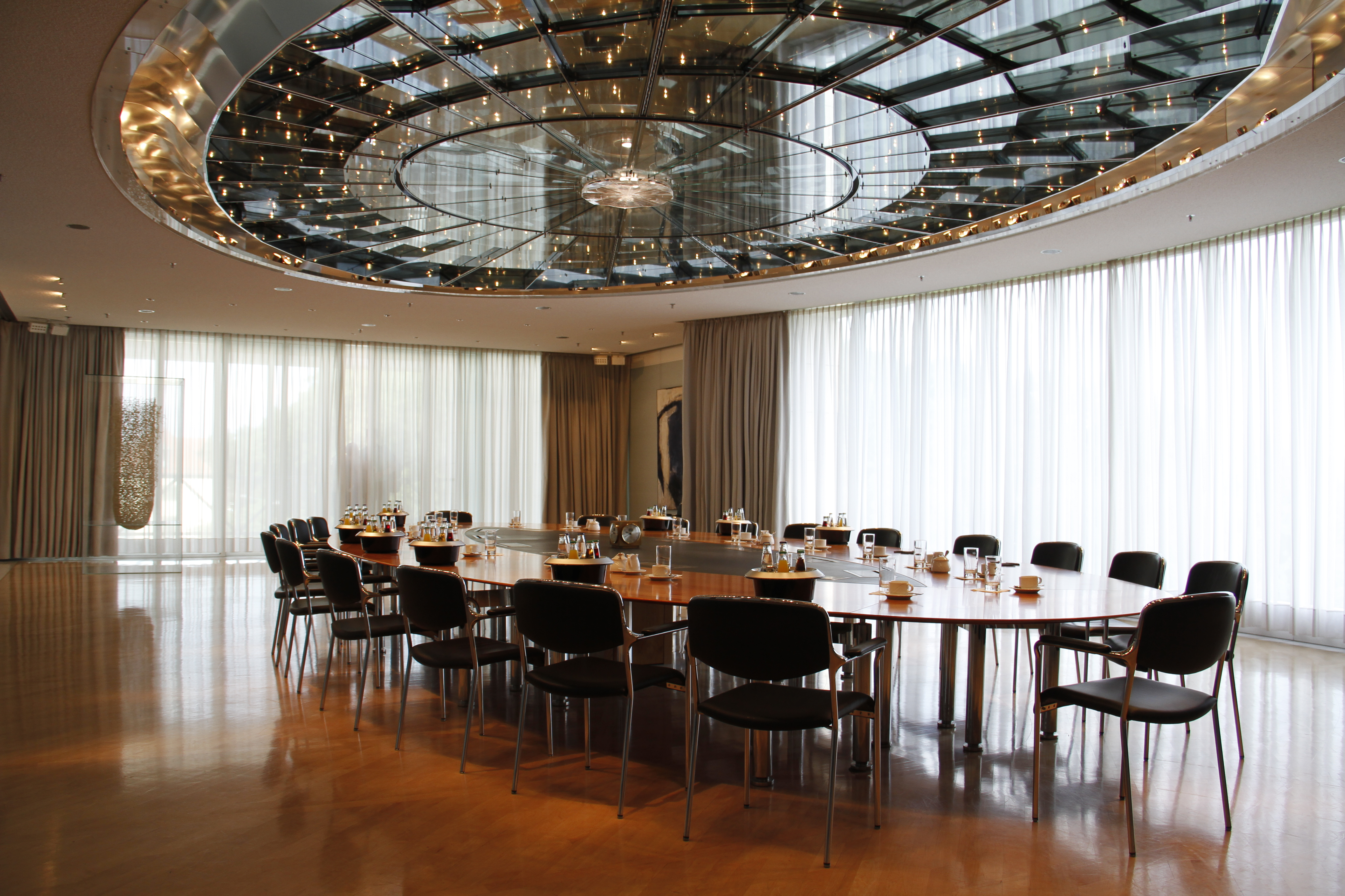 Bayerische Staatskanzlei, München. Kabinettssaal